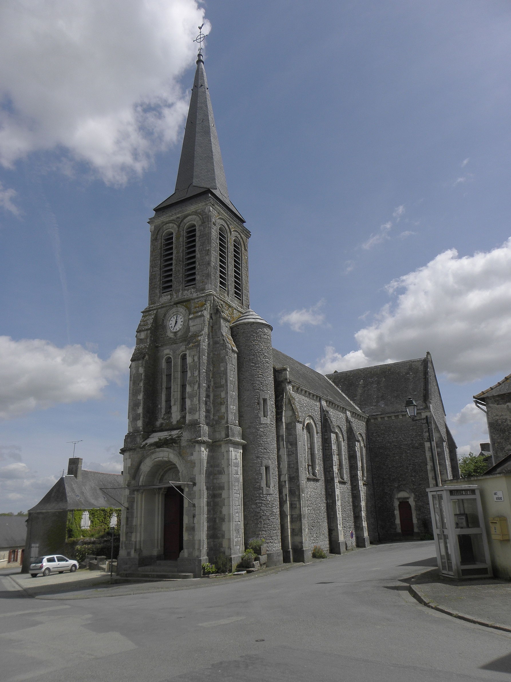 Église de Saint-Georges-le-Fléchard (53). Façade principale.